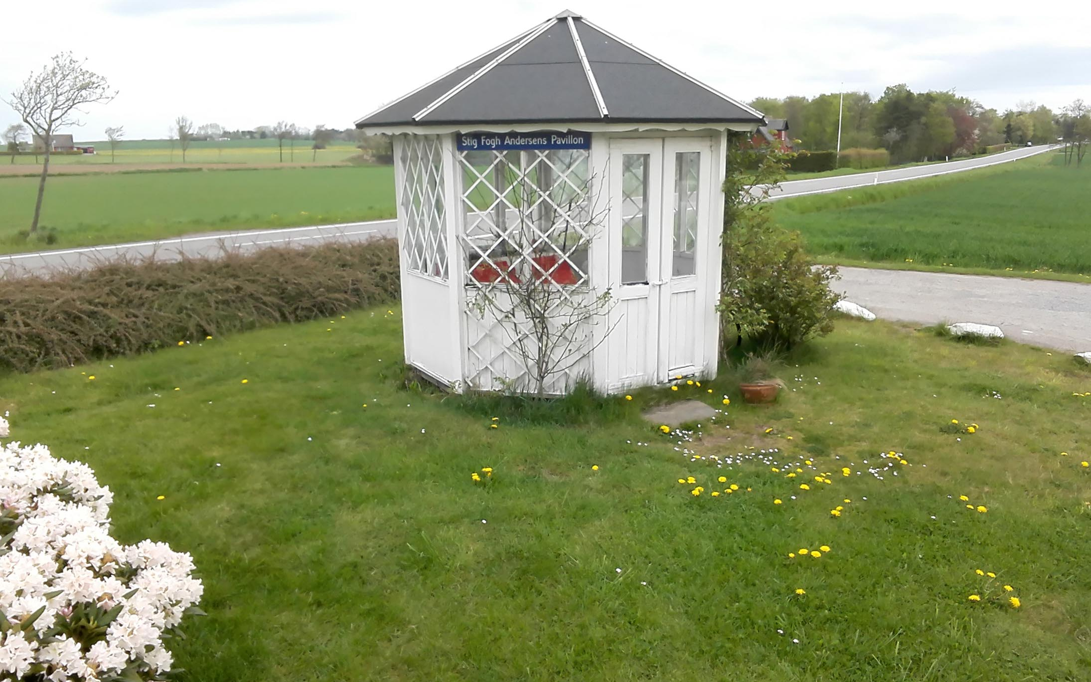 Stig Fogh Andersens Pavillon ved Fru Petersens Cafe uden for Østermarie